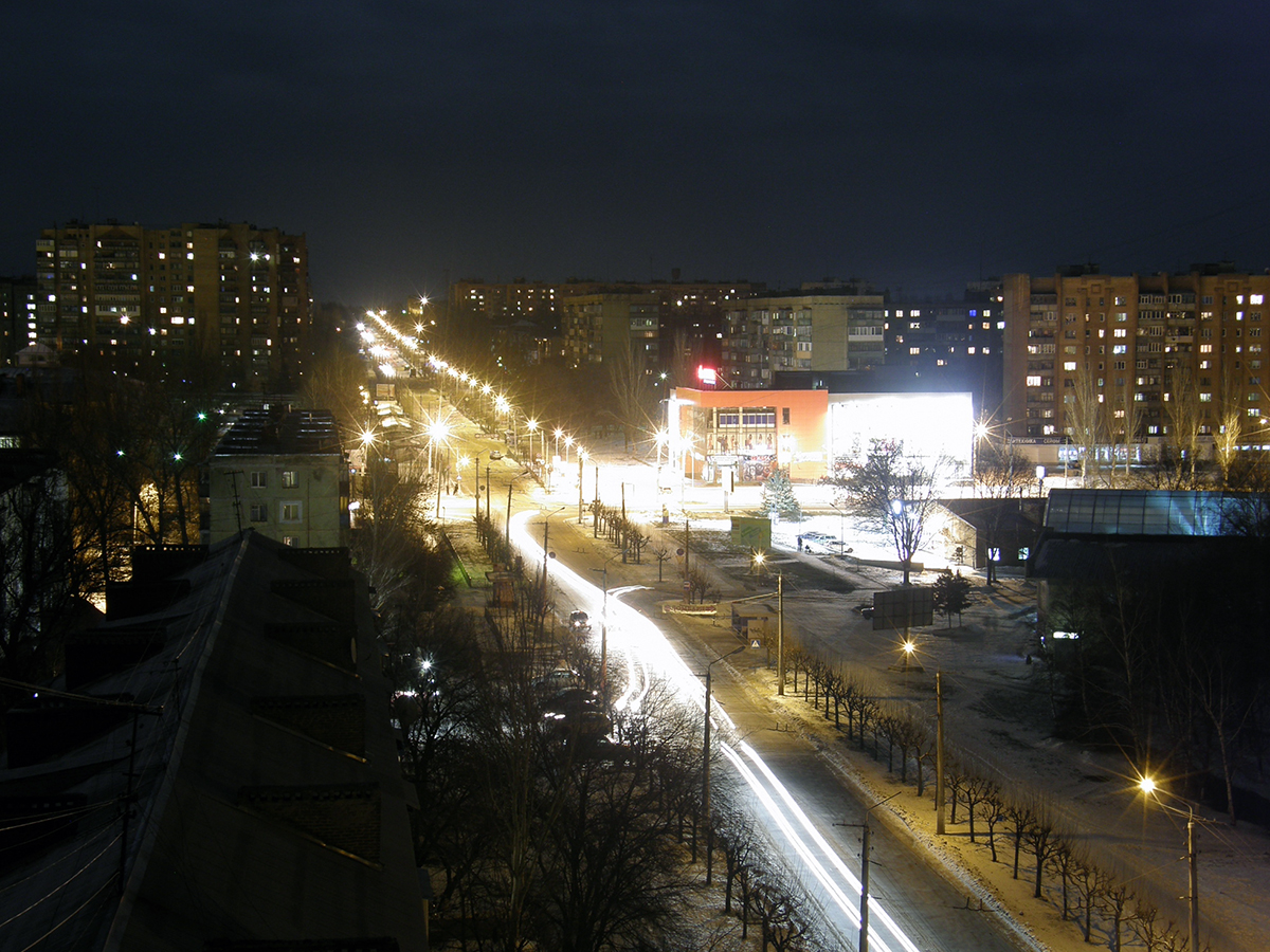 Краматорск